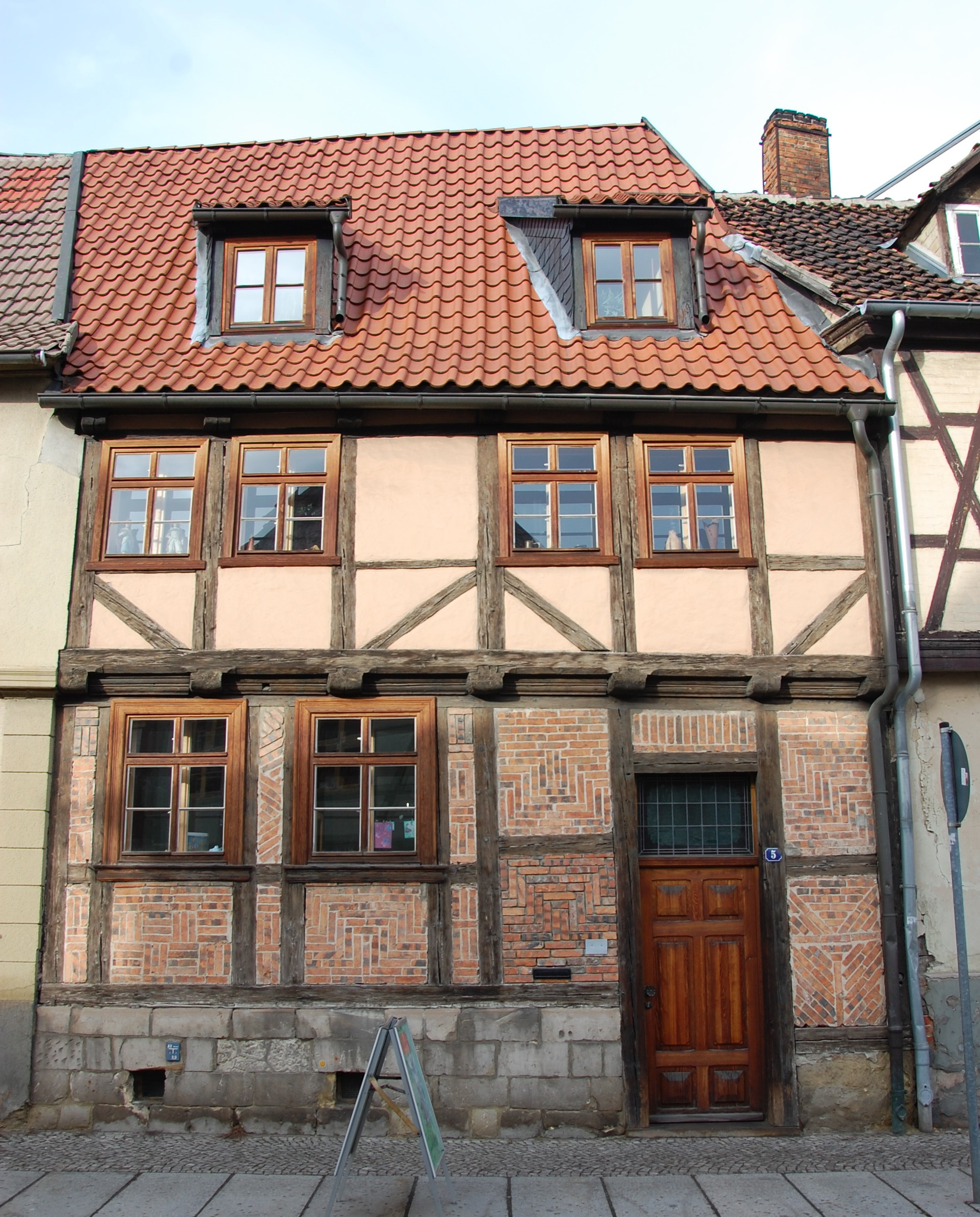 Haus Pölkenstraße 5 in Quedlinburg